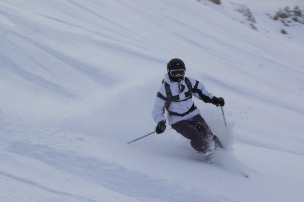 Une Skieuse hors piste